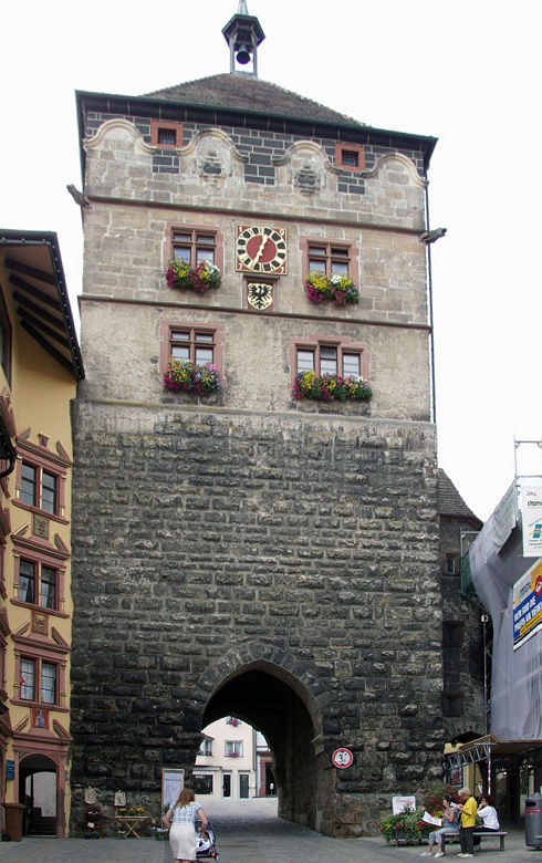 Medieval tower in Rottweil (Baden-Württemberg)